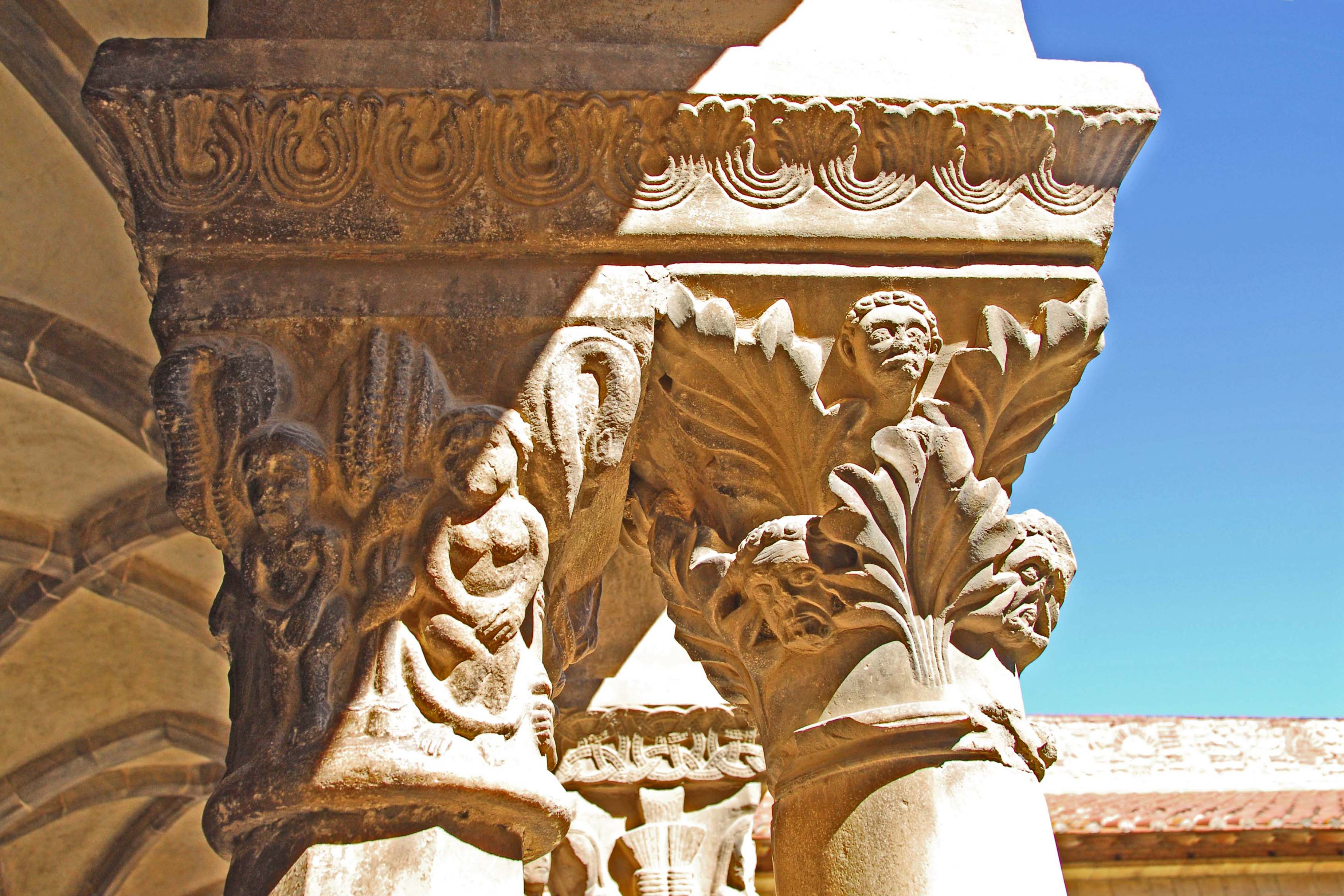 Ste-Eulalie-et-Ste-Julie_d’Elne, Säulenkapitelle, Adam+Eva, Pflanzen